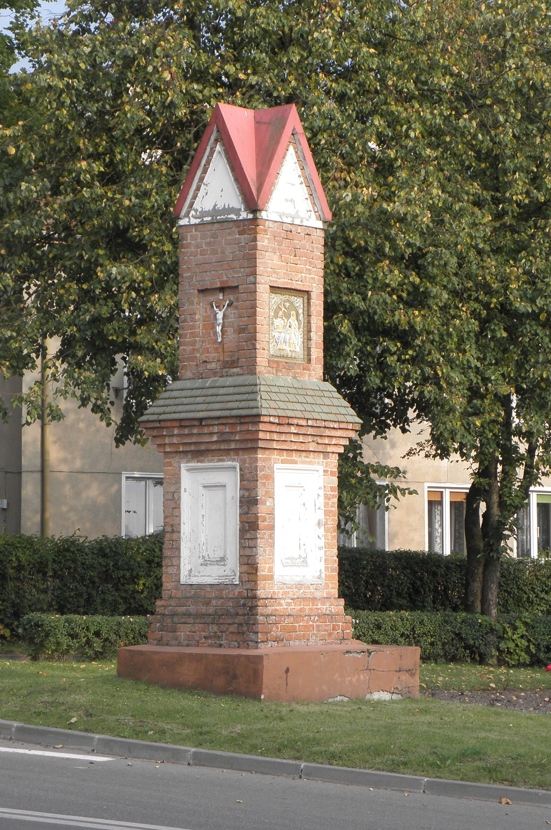 Kapliczka przydrożna przy ulicy Niepodległości. Gmina Biskupiec, powiat olsztyński.